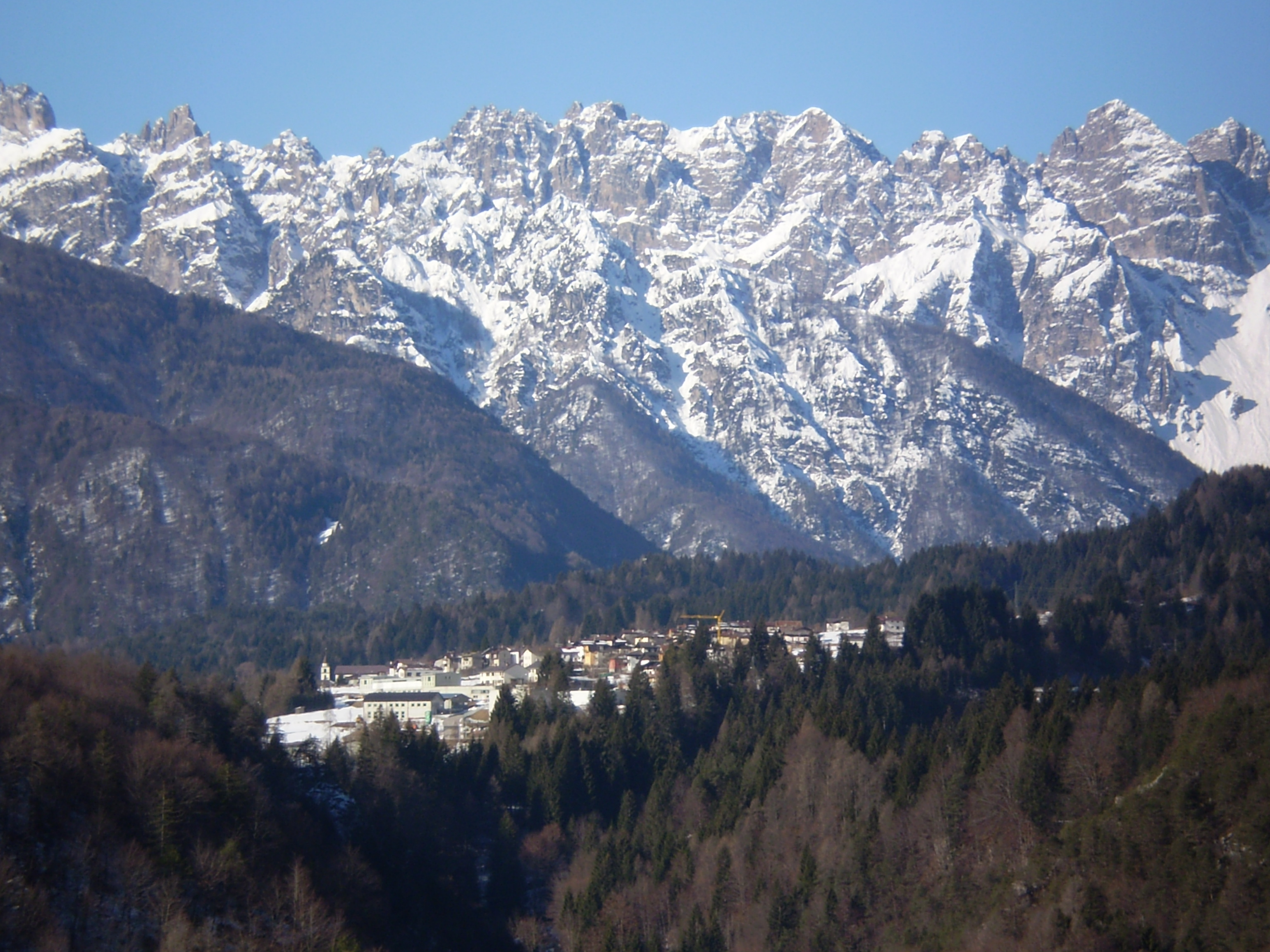 Il paîs di For di Sot, in Cjargne